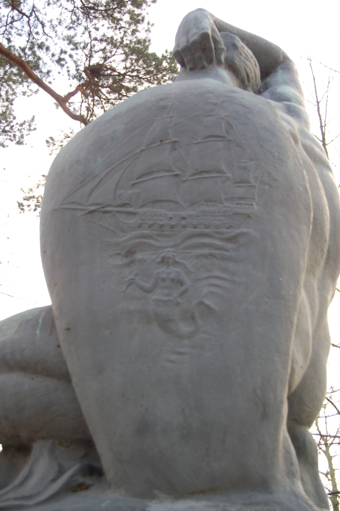 Ustka, "Umierający wojownik" - pomnik autorstwa Josefa Thoraka ku czci 76 mieszkańców Ustki poległych w czasie I wojny światowej (tarcza wojownika z herbem Ustki)